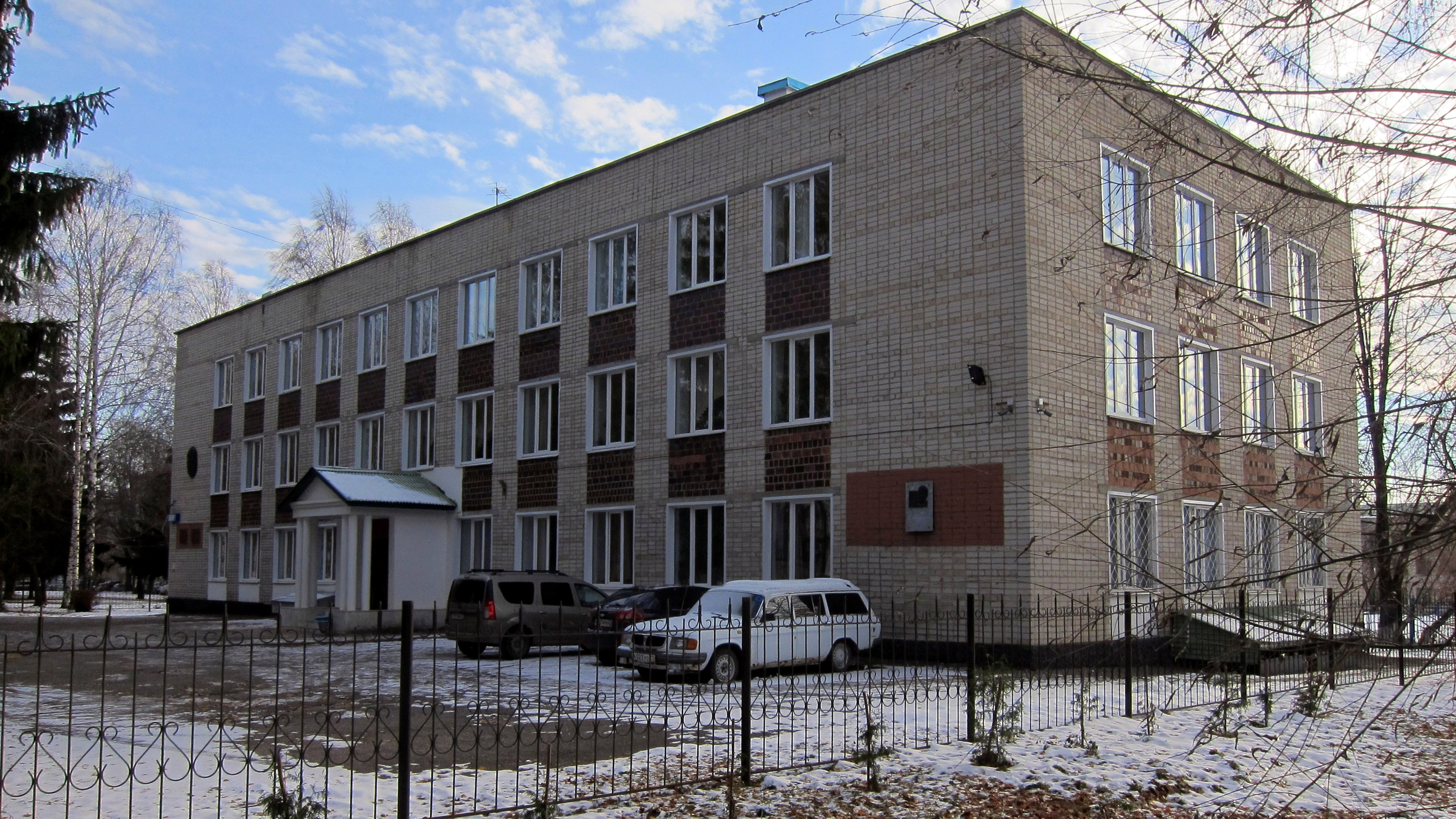 Здание, в котором расположен Чувашский государственный институт гуманитарных наук. Чебоксары Чӑвашла: Чăваш патшалăх гуманитари ăслăлăхĕсен институчĕ